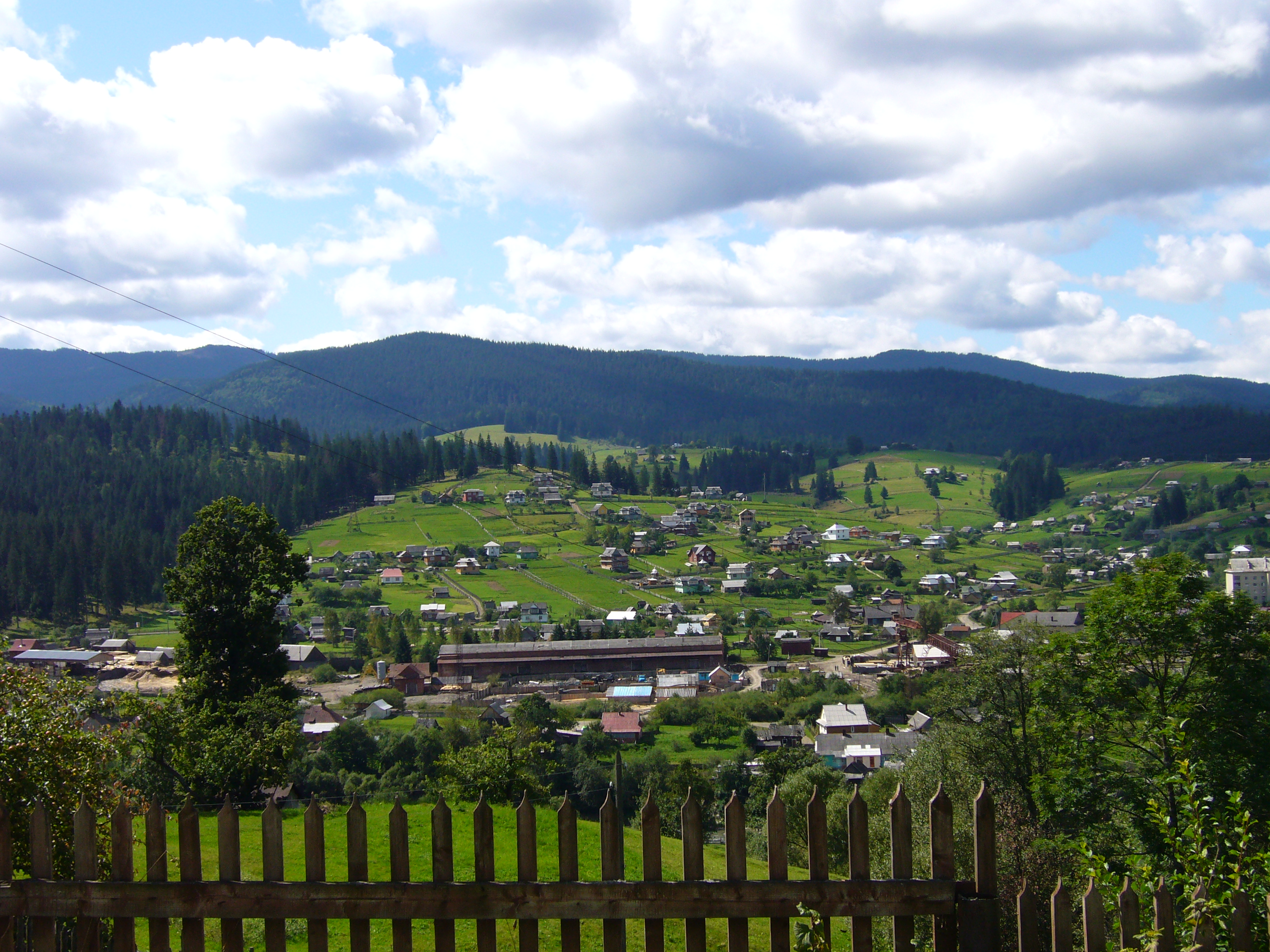 Ворохта-Путильское низкогорье у Ворохты